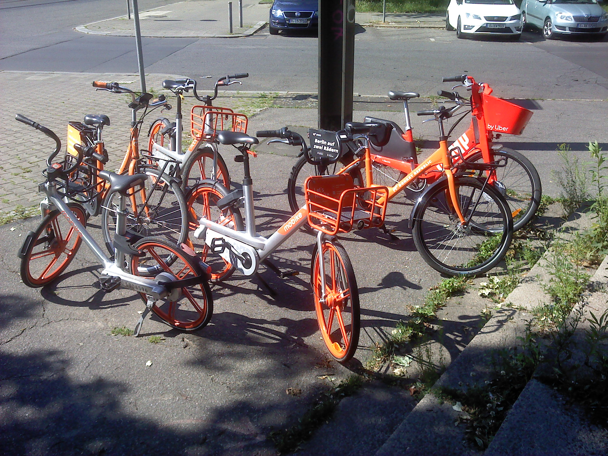 Räder von zwei Verleihfirmen in Berlin, Juni 2019. Mobikes sind in zwei verschiedenen Ausführungen (Rahmenfarben Körbe, Rädergrößen) zu sehen.